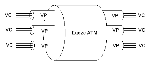 ATM